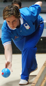 Elisa Luccarini, boccista italiana e portacolori della nazionale.